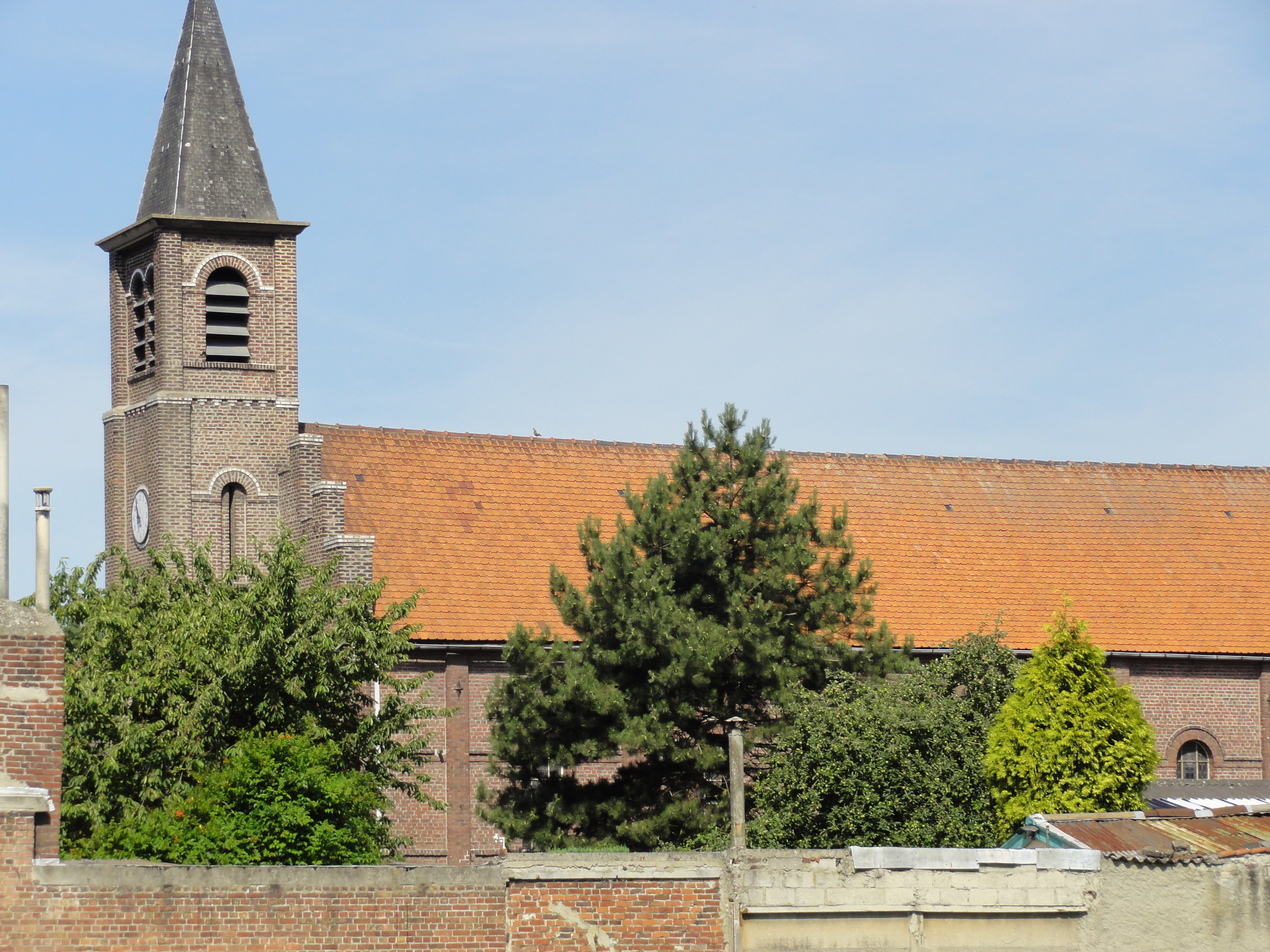 Église Sainte-Barbe des cités de la Fosse n° 3 de la Compagnie des mines de l'Escarpelle, Flers-en-Escrebieux, Nord, Nord-Pas-de-Calais, France.